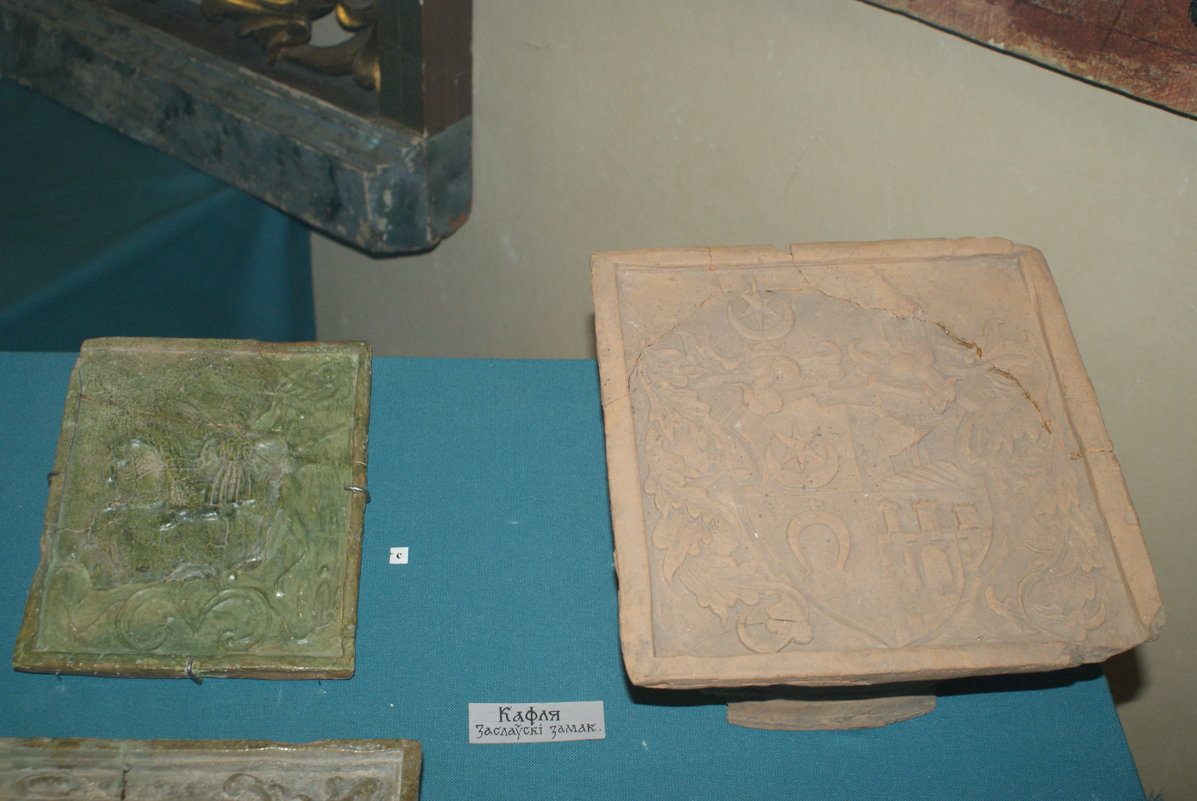 Кафля з Заслаўскага замку